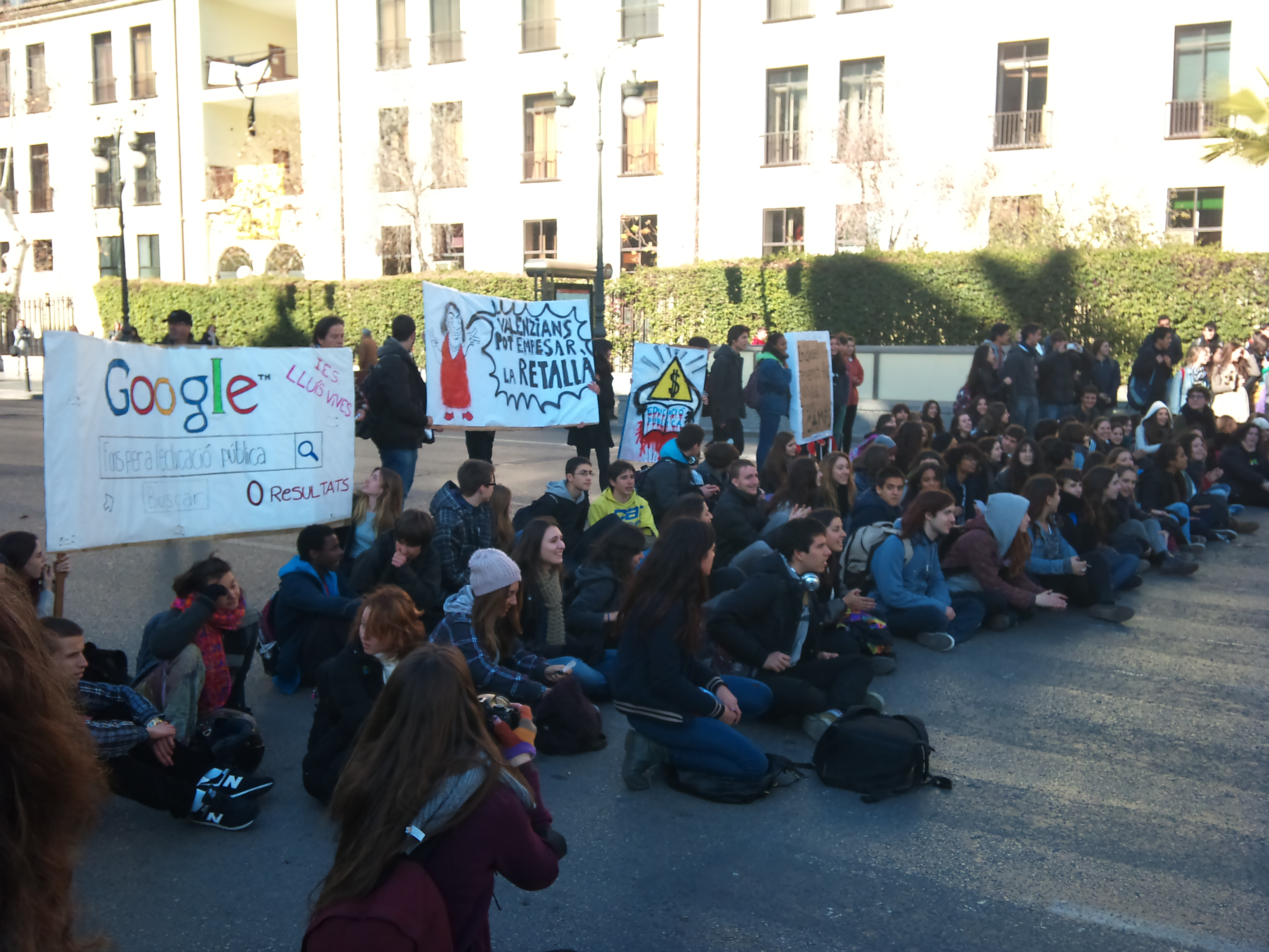 Sentada en protesta per les retallades del Consell a València. Esta va ser la primera manifestació de la que es coneixeria com "Primavera Valenciana".